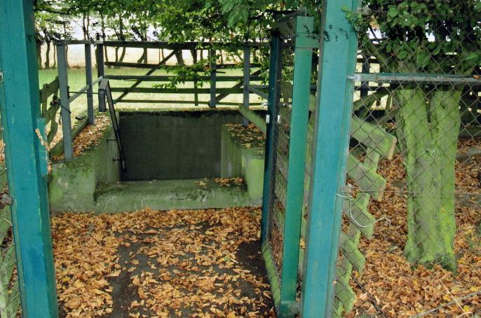 Bunkereingang Isweiler bei Nörvenich own work, papa1234 2005-09-30